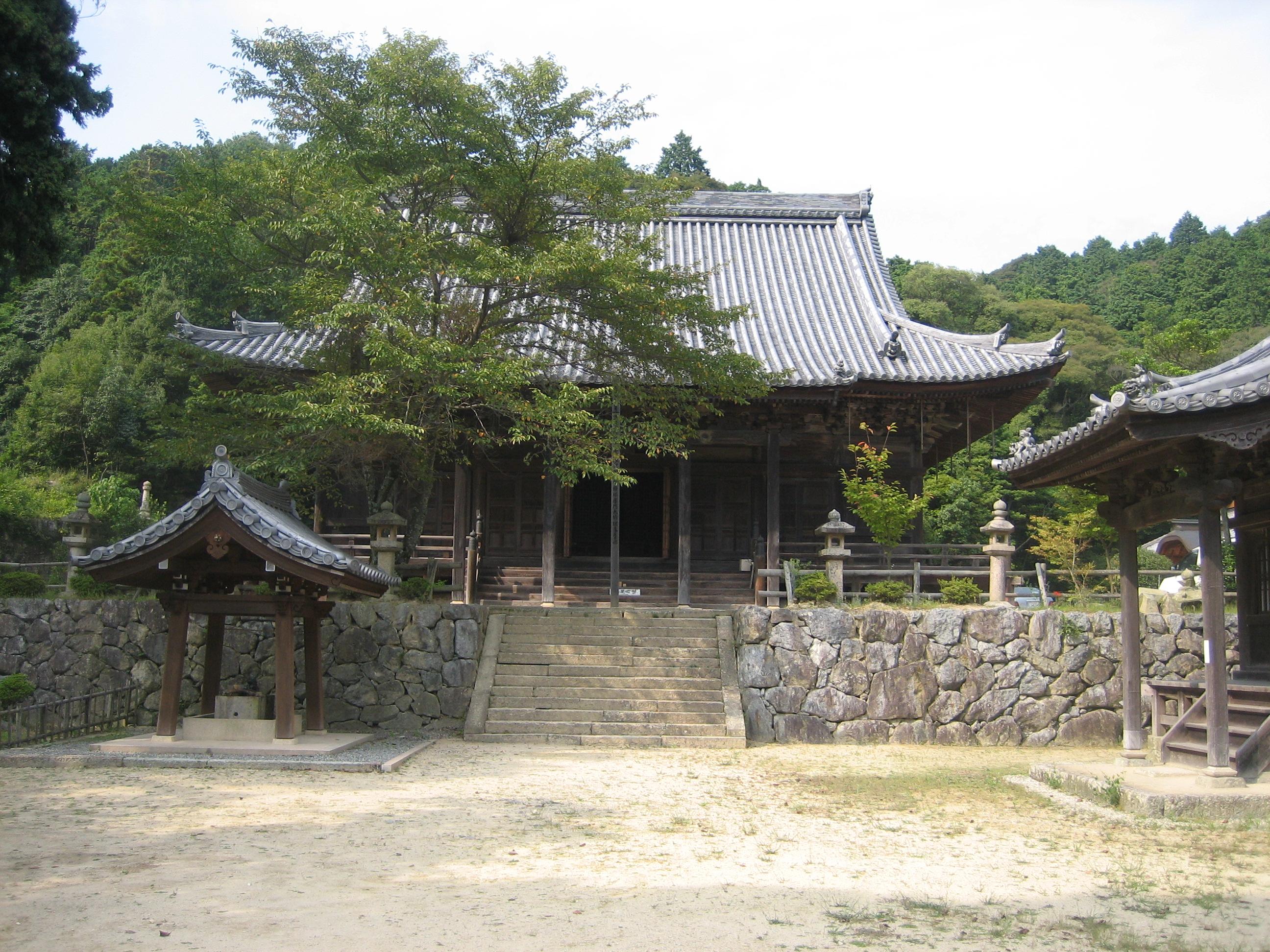 兵庫県姫路市にある増位山随願寺。